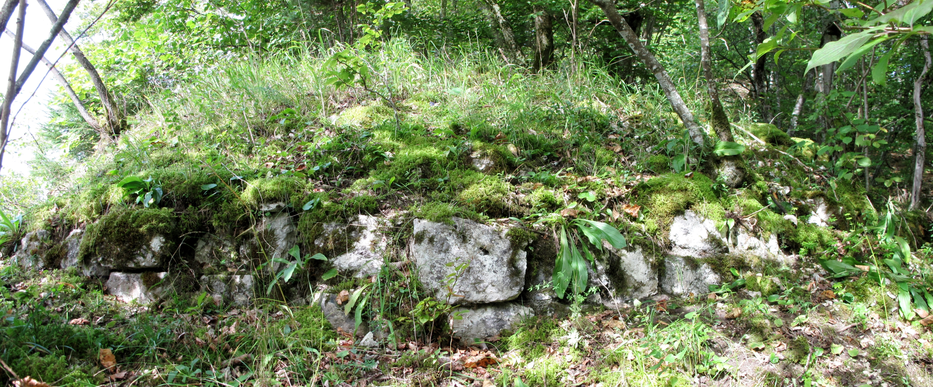 Umfassungsmauerreste im Westteil der unteren Burg. Möglicherweise bildeten diese zugleich die Aussenmauer eines Gebäudes oder Turms.